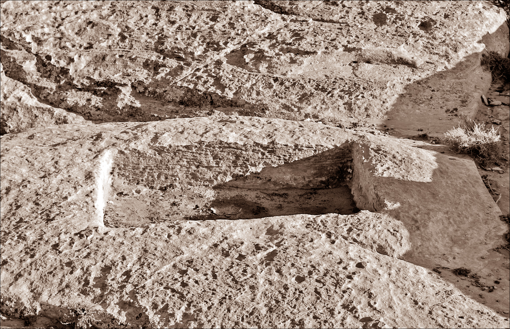 Bassin rupestre creusé dans le rocher du désert près de Pétra.